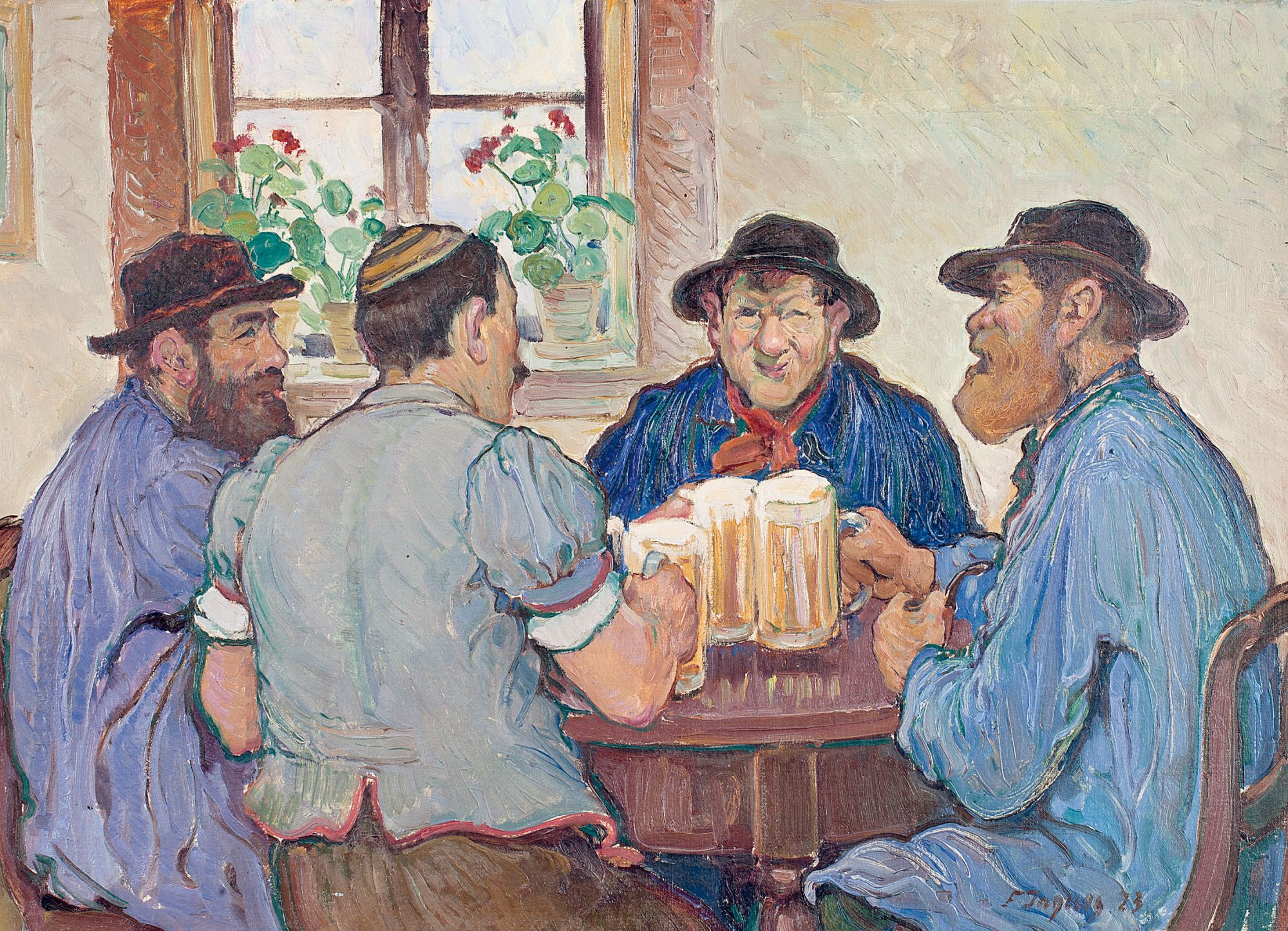 Paysans fribourgeois au bistrot